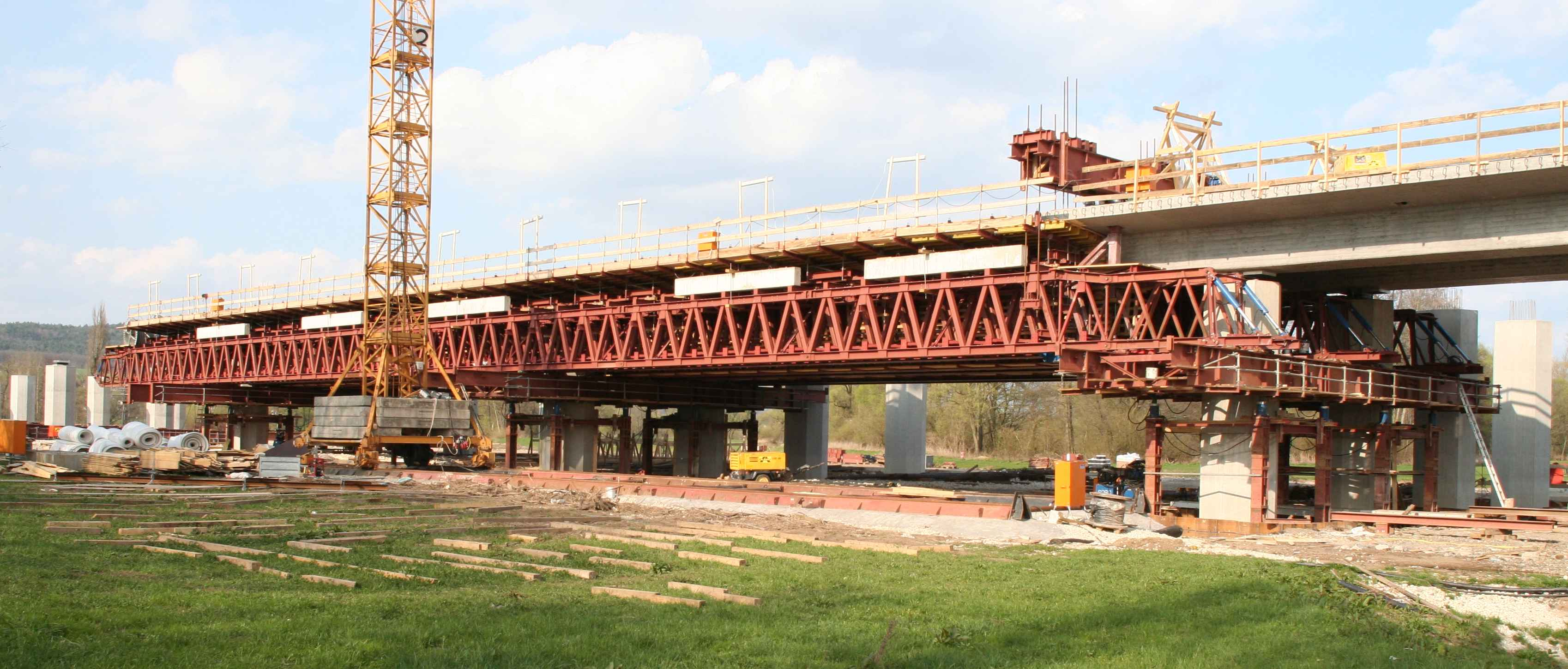 Maintalbridge Vorschubgerüst für Plattenbalken